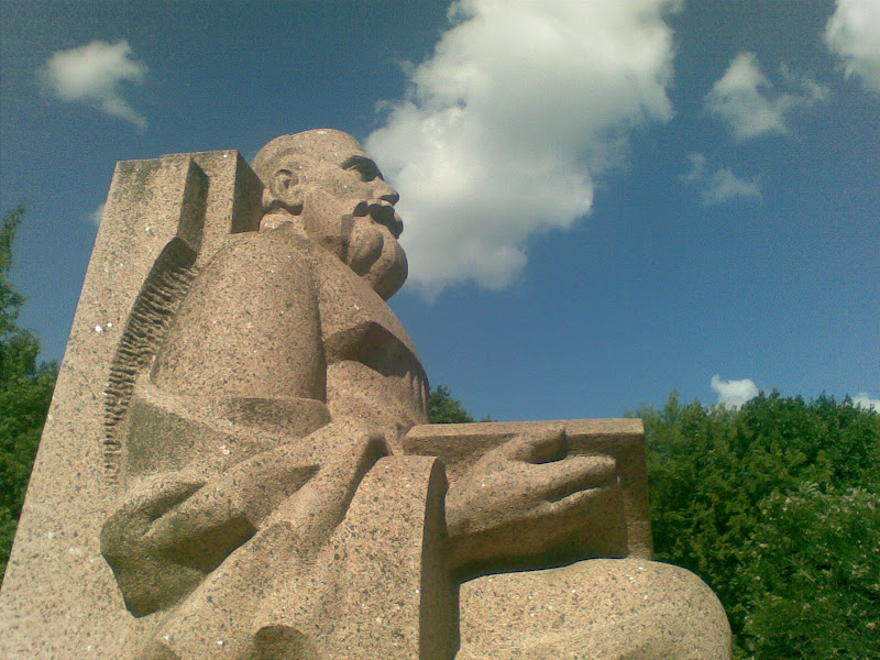 Jakob Hurda monument Tartus Tiigi tänava pargis, lähivaade.